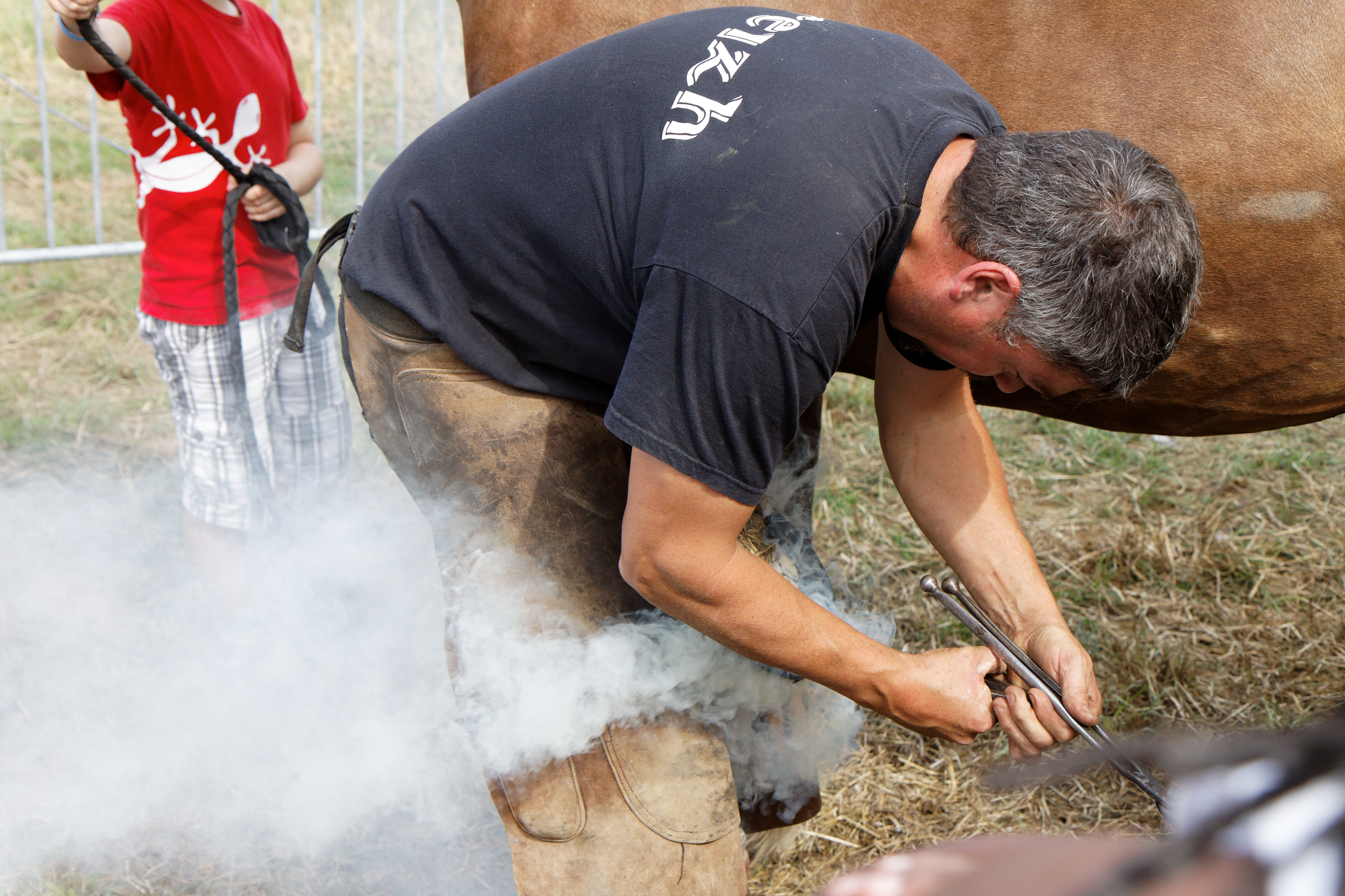 Étape 6 : Première pose du fer à chaud pour s'assurer grâce à la brulure de la corne que le fer sera uniformément au contact du sabot.